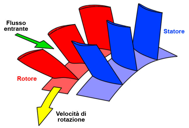 Girante di un compressore assiale. In rosso il rotore, in blu lo statore.